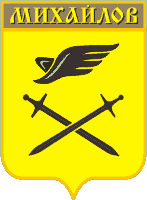 неофициальный герб г. Михайлов советских времен